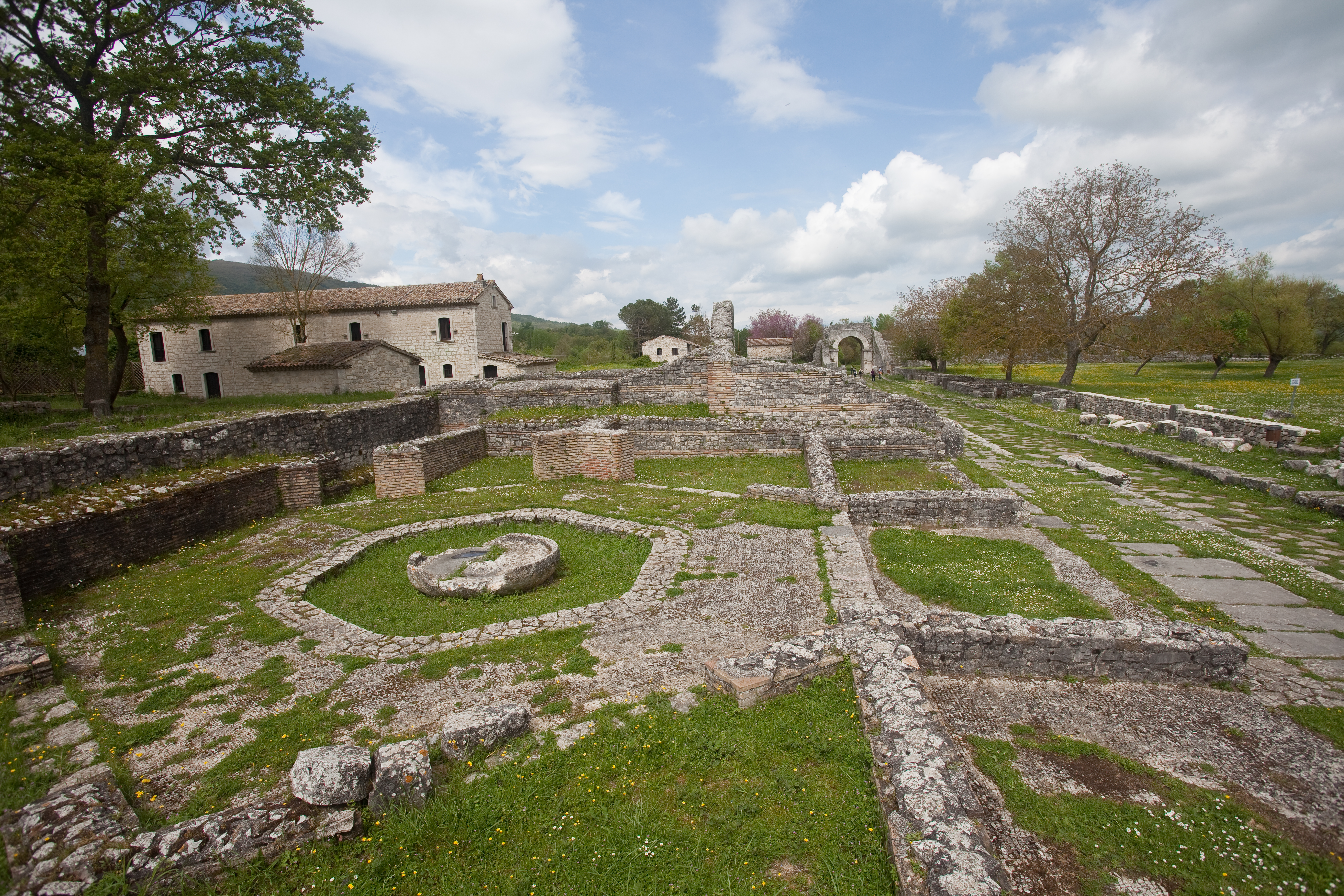 Area archeologica - MIBAC This is a photo of a monument which is part of cultural heritage of Italy.